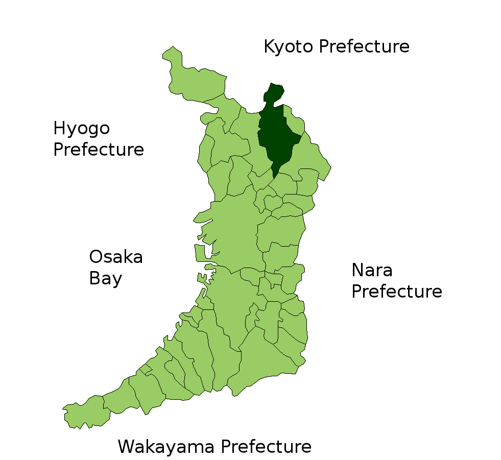 Location Map of Takatsuki in Osaka-fu, Japan